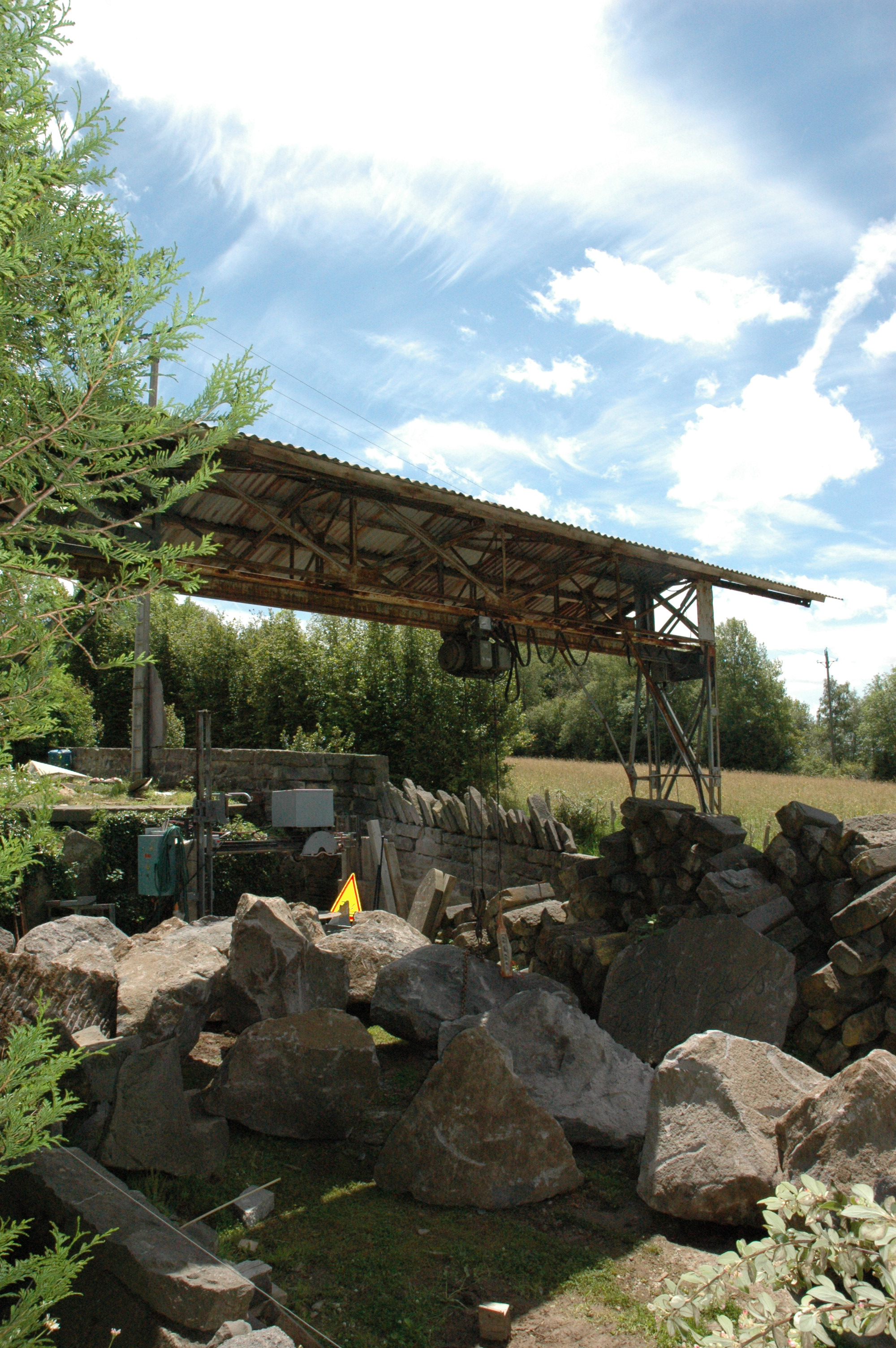 Une vue de exterieure de l'atelier